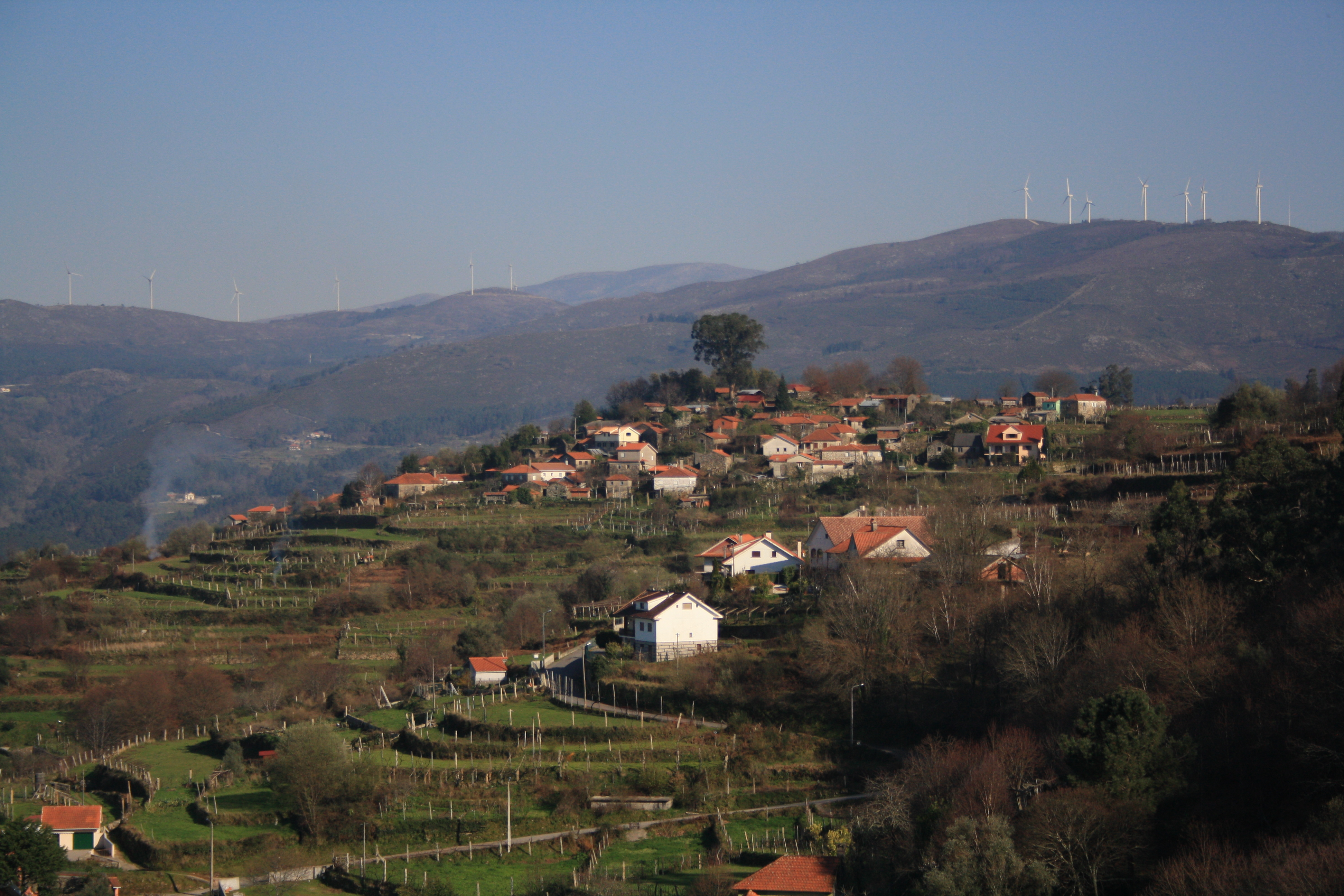 Aldea de Pereiro